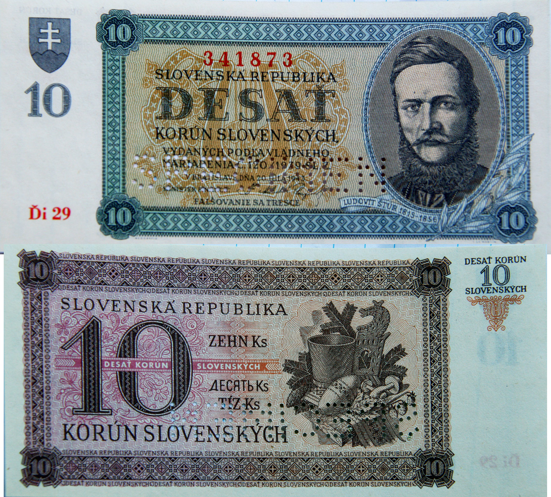 10 korún slovenských z roku 1943 (obdobie vojnovej Slovenskej rpeubliky). Desaťkorunáčka. Averz: vľavo text SLOVENSKÁ REPUBLIKA / DESAŤ /KORÚN SLOVENSKÝCH /VYDANÝCH PODĽA VLÁDNEHO /NARIADENIA Č. 120/1939 SL. Z./ V BRATISLAVE DŇA 20. JÚLA 1943... Vpravo obraz Ľudovíta Štúra zľava. Reverz: vľavo nápis SLOVENSKÁ REPUBLIKA / 10 / KORÚN SLOVENSKÝCH...Vpravo na bielom okraji črpák a oštiepok a označenie hodnoty.